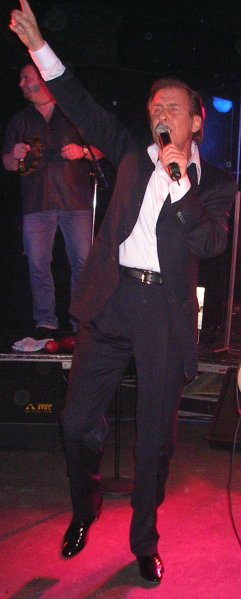 Michael Holm in Köln in 2004. Foto: degaaf